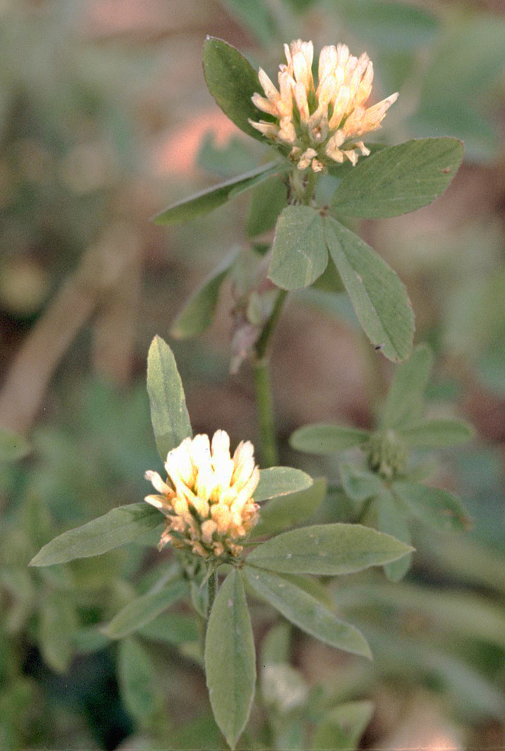 Ägyptische Klee (Trifolium alexandrinum) in Unterfranken.